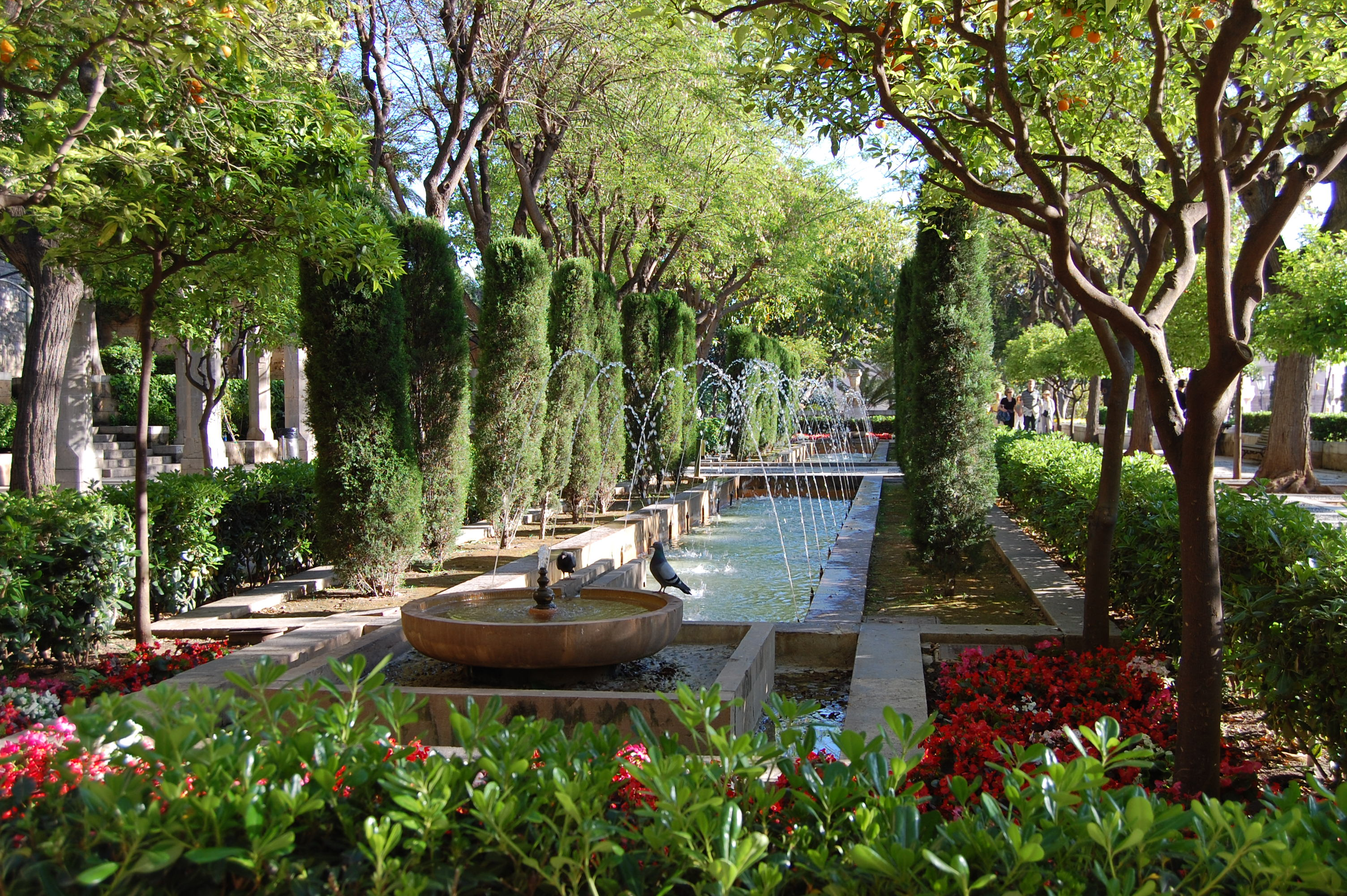 Parkanlage im Zentrum Palmas